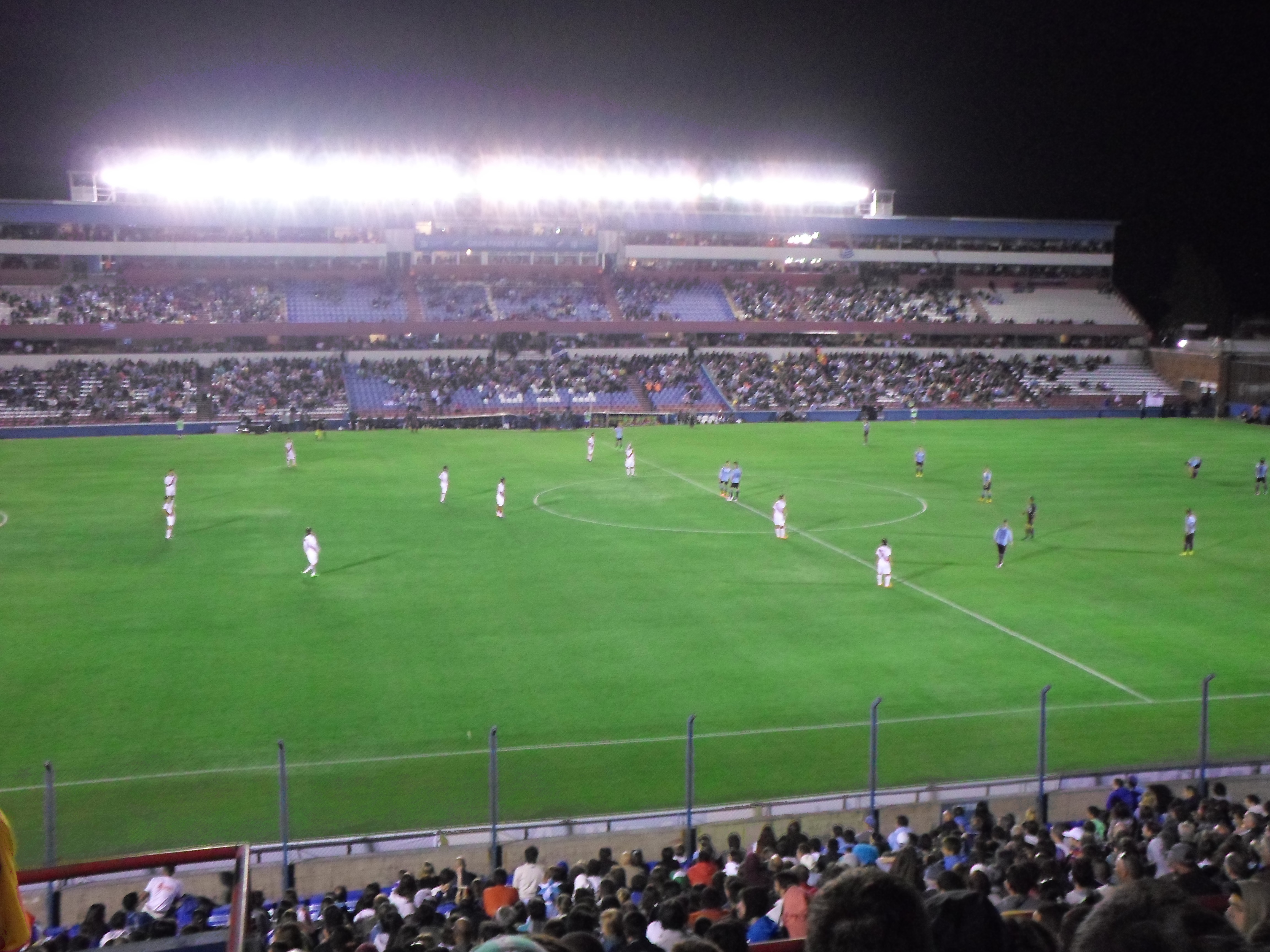 Gran Parque Central, Uruguay vs Peru por el Campeonato sudamericano Sub20 del 2015.